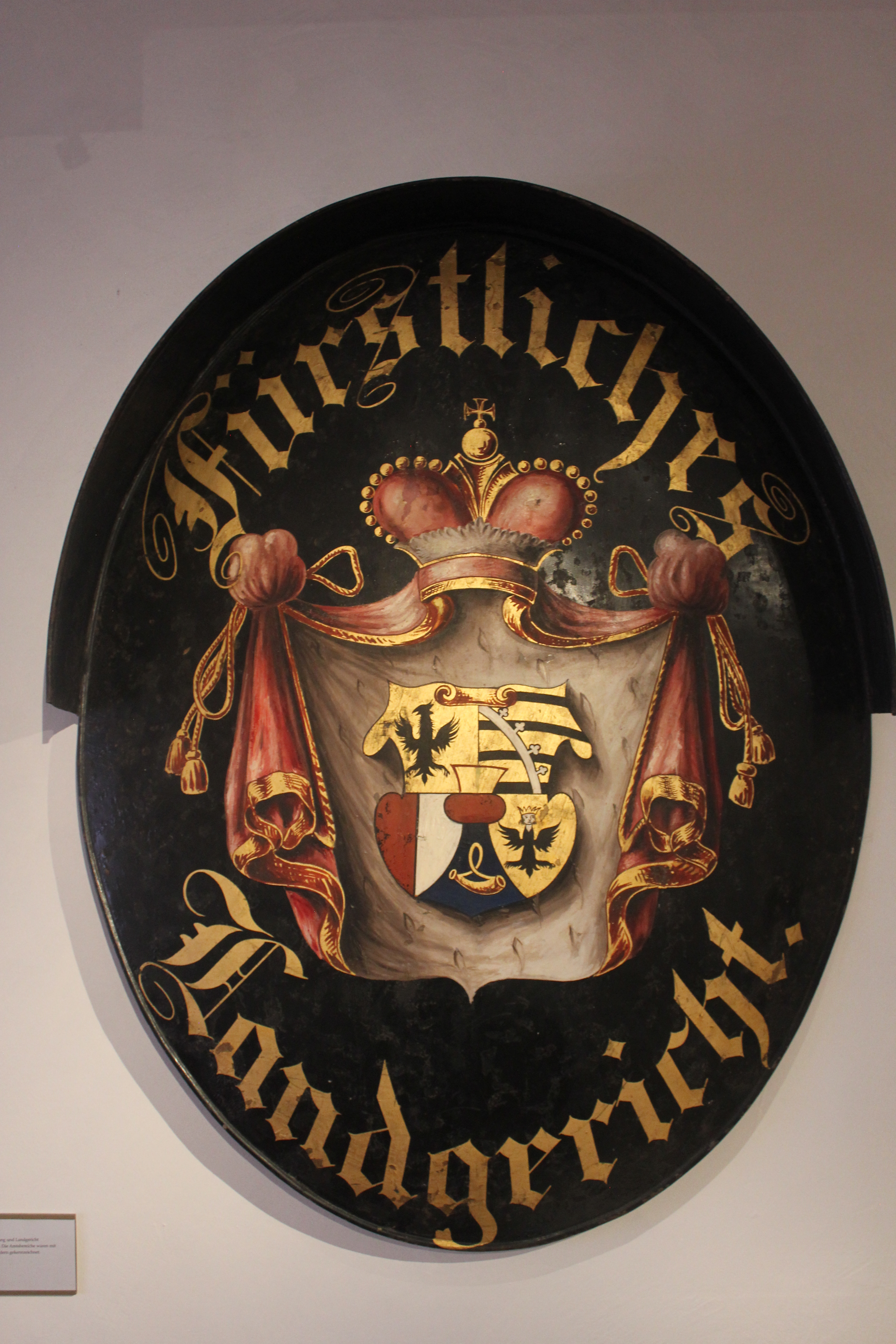 Amtsschild aus dem Jahr 1905 für das Liechtensteinische Landgericht im damals neu errichteten Regierungsgebäude. Heute ist das Schild Teil der Dauerausstellung im Liechtensteinischen Landesmuseum.